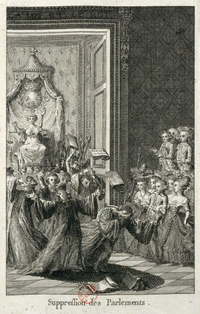 Suppression des Parlements